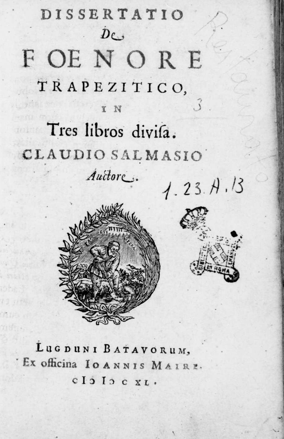 Frontespizio